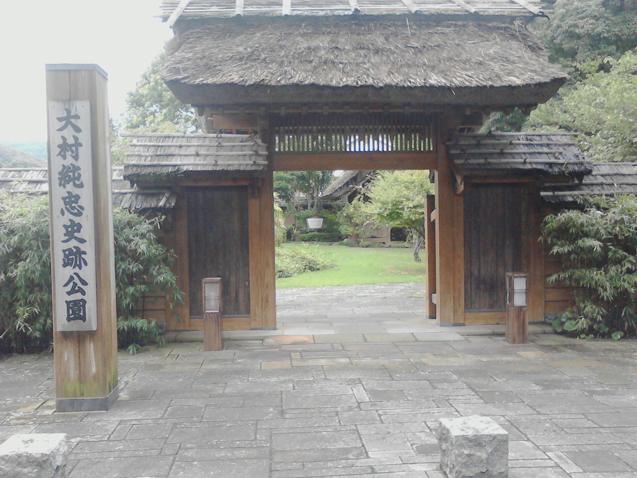 大村純忠史跡公園